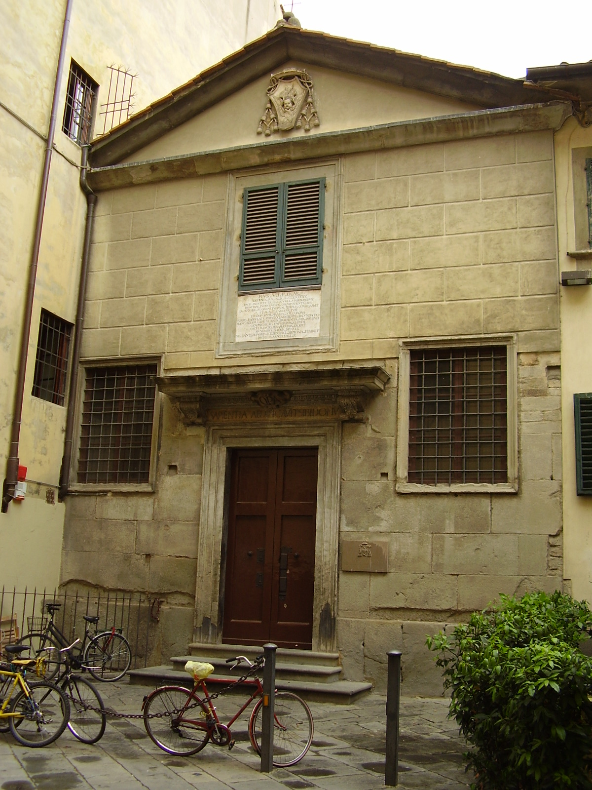 Capitolo dei Canonici, near Duomo square in Florence, Italy